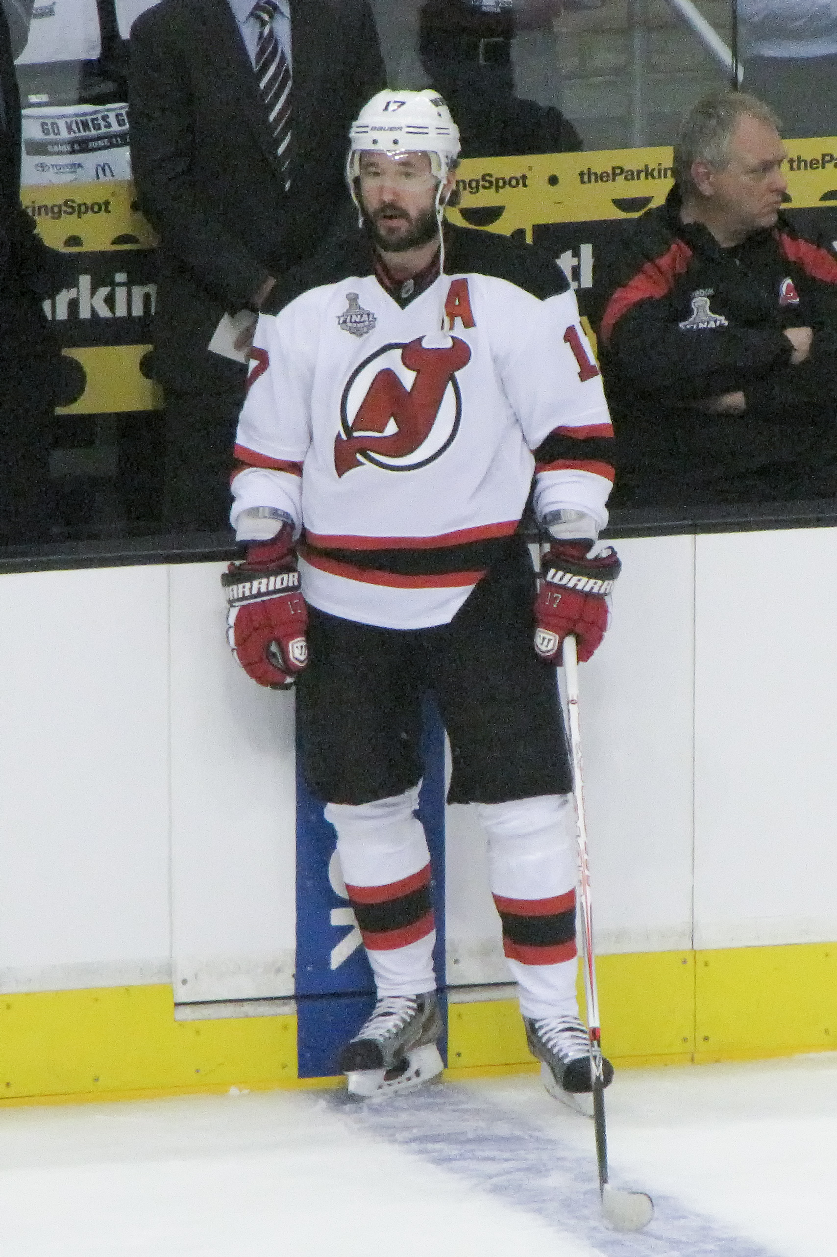 Илья́ Ковальчу́к (Ilya Kovalchuk)